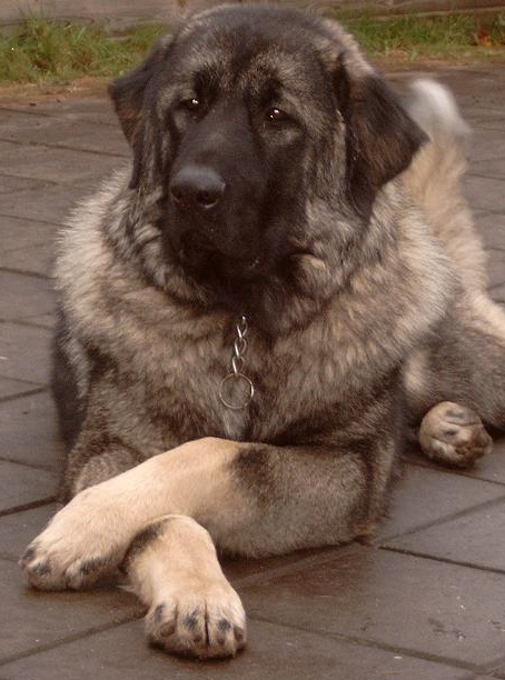 A Sarplaninac.